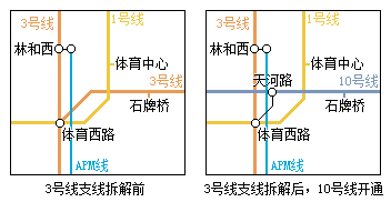 廣州地鐵三號線支線拆解示意圖（體育西路~石牌橋一帶）